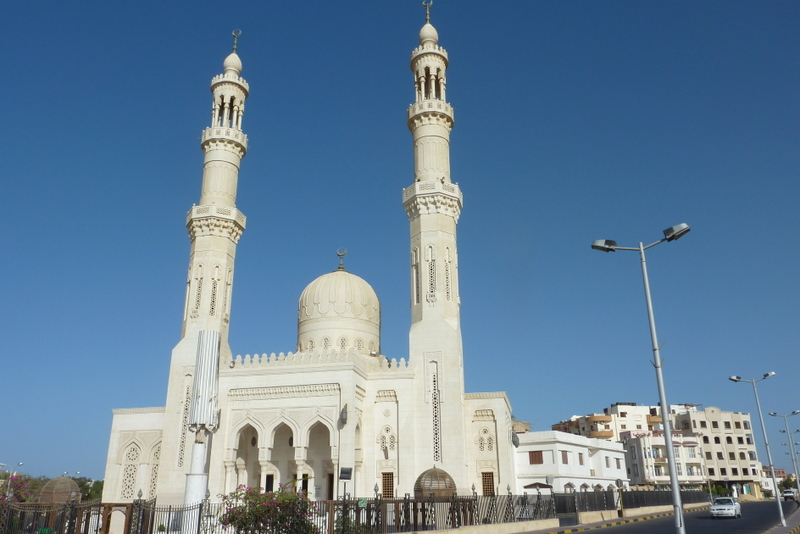 Aldahaar Moschee in Hurghada